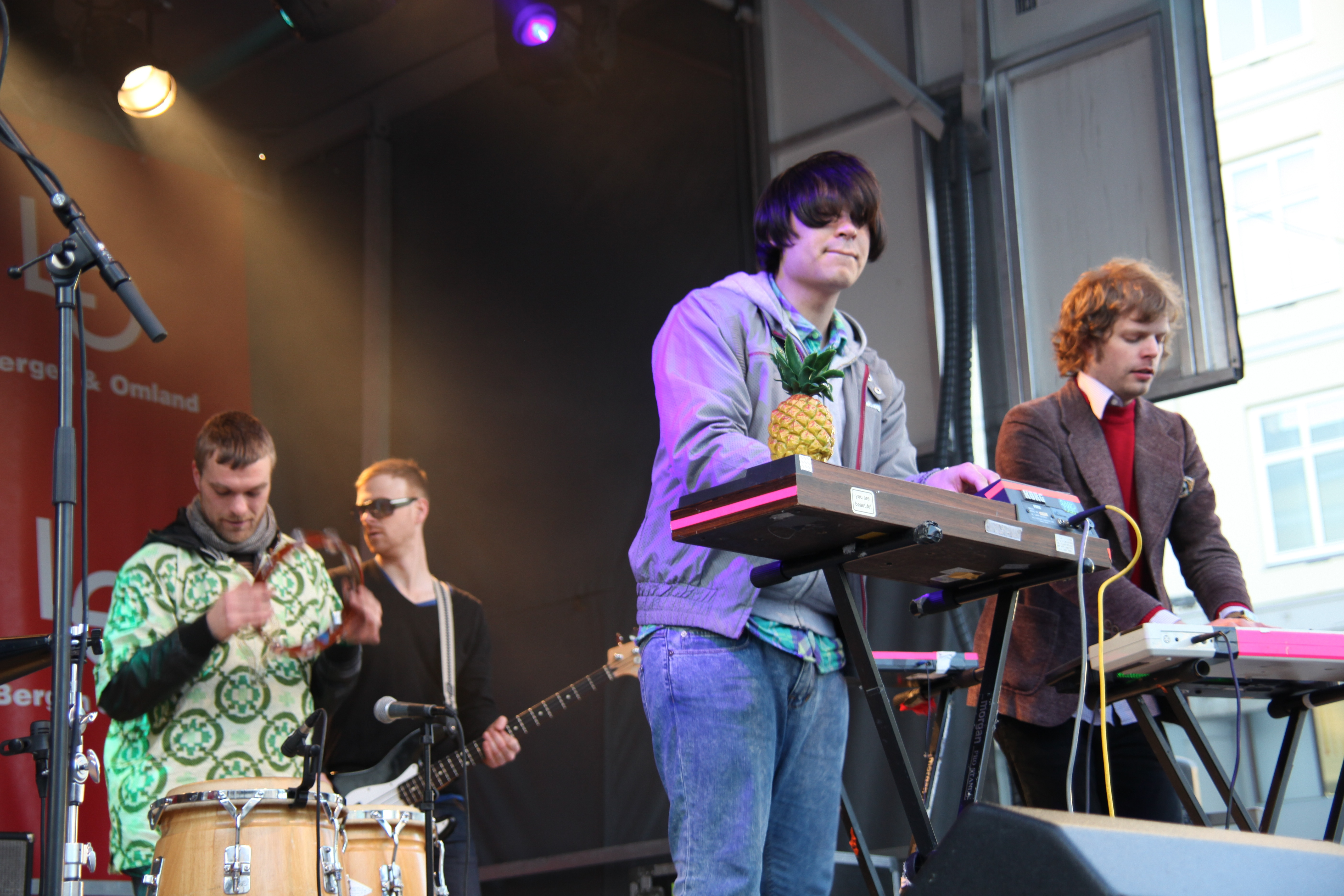 Casiokids